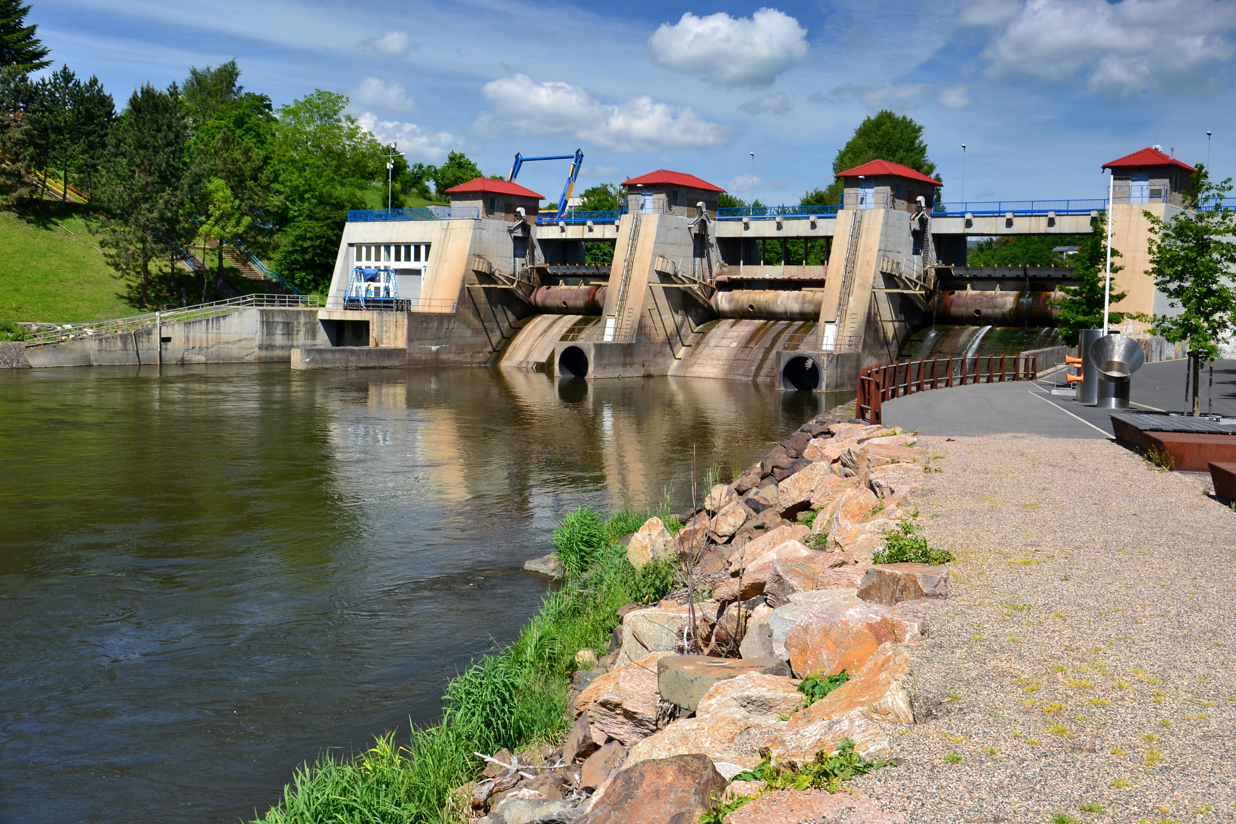 Hráz přehrady